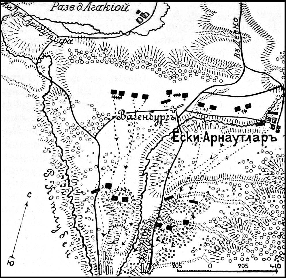 Это изображение (карта д. Ески Арнаутлар, сегодня село Староселец) было использовано для иллюстрирования статьи «Ески-Арнаутлар», опубликованной в десятом томе «Военной энциклопедии», который был издан книгоиздательским товариществом И. Д. Сытина в 1912—1913 гг. в столице Российской империи городе Санкт-Петербурге.